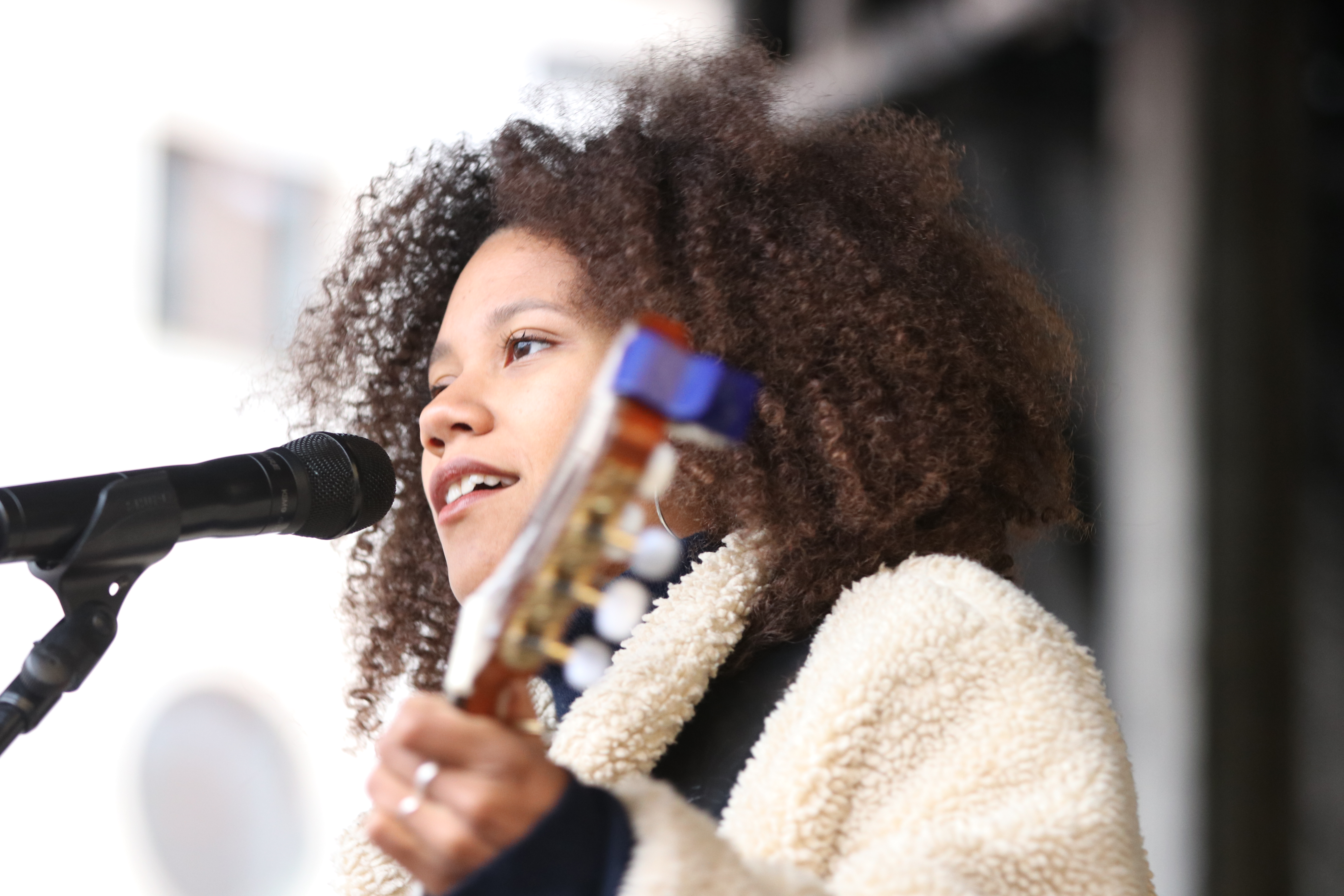 Ami Warning, Singer-Songwriter aus München. Auftritt am 2018-10-03 auf dem Odeonsplatz